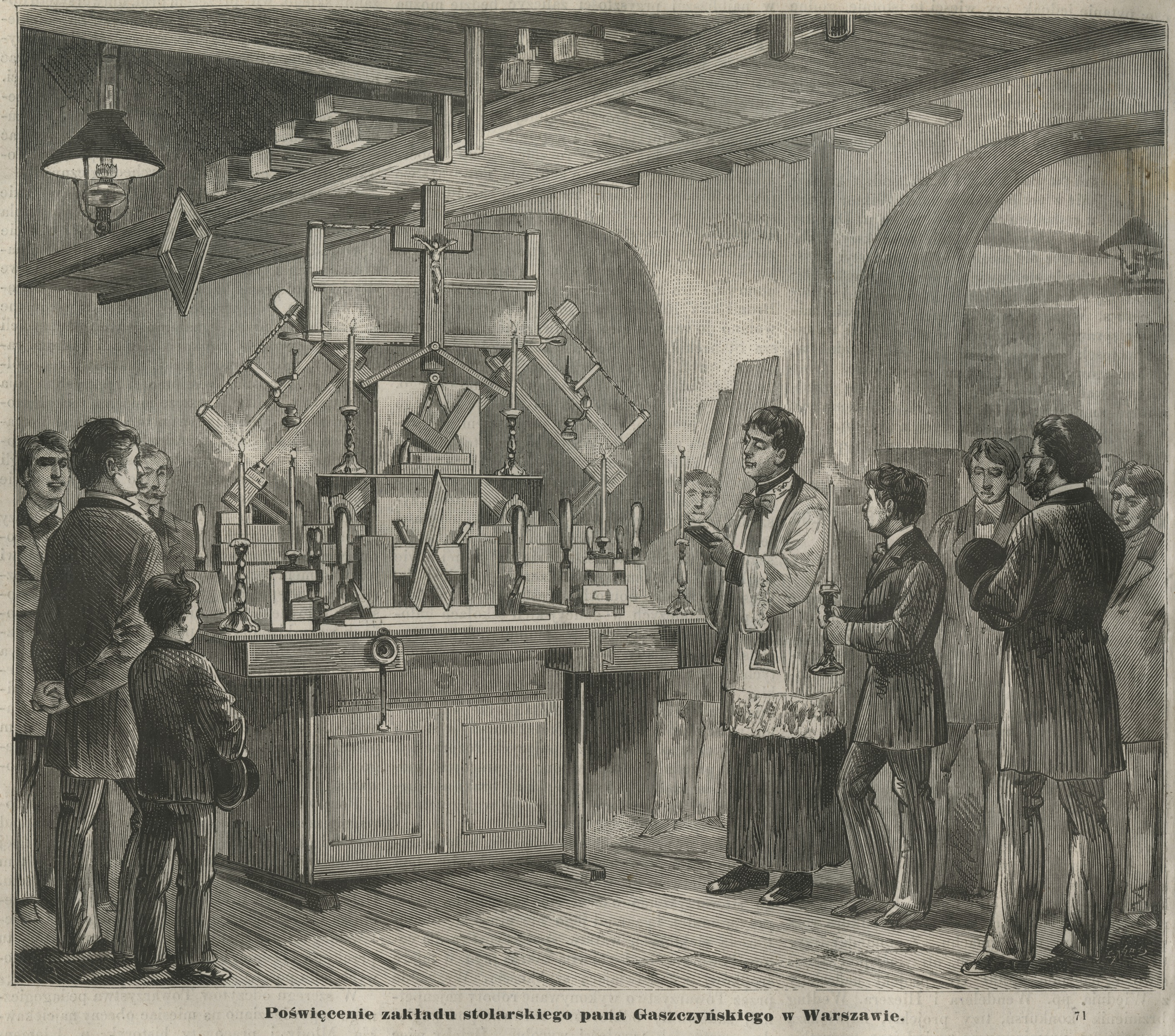 Poświęcenie zakładu stolarskiego pana Gaszczyńskiego w Warszawie